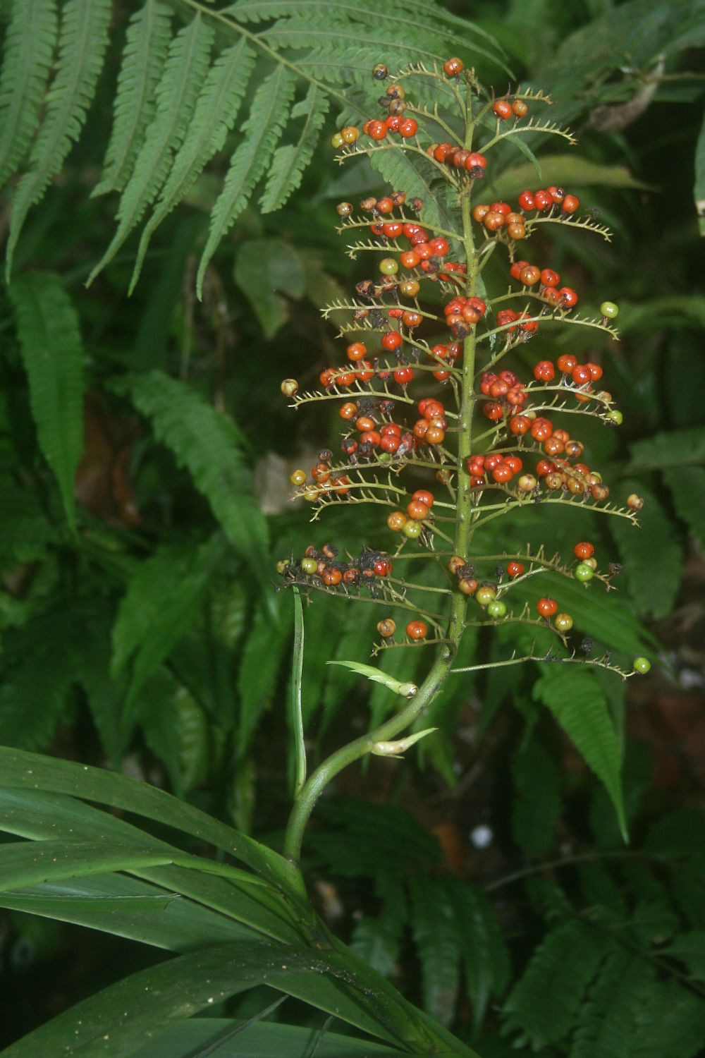 Xiphidium caeruleum, Haemodoraceae – Kolumbien/Colombia: Dpto. Magdalena, Parque Nacional Natural Tayrona, NW Pueblito Chairama, 260–300 m